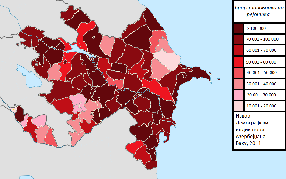 Дистрибуција становништва у Азербејџану